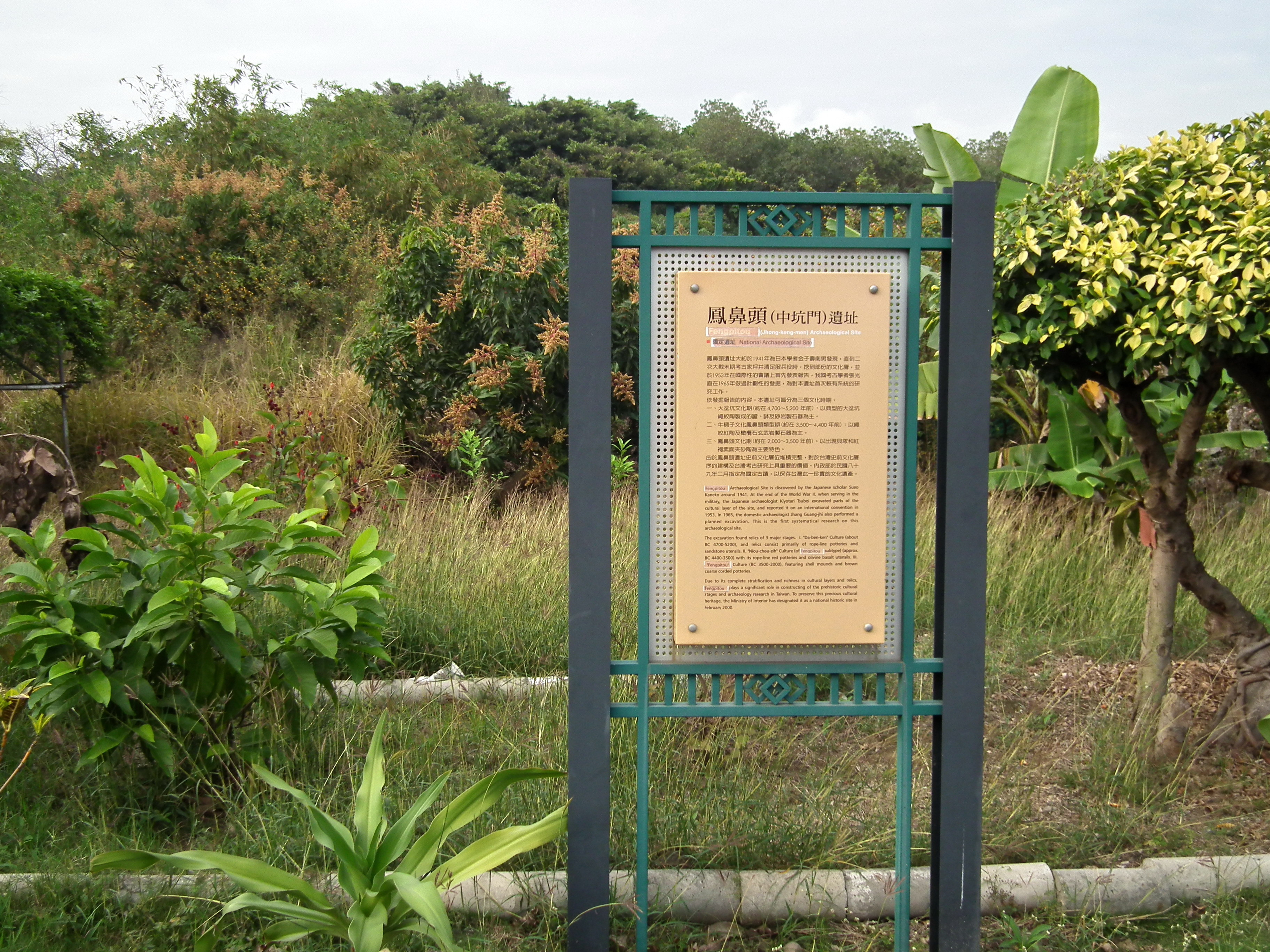 Fengbitou Archaeological Site 鳳鼻頭考古遗址